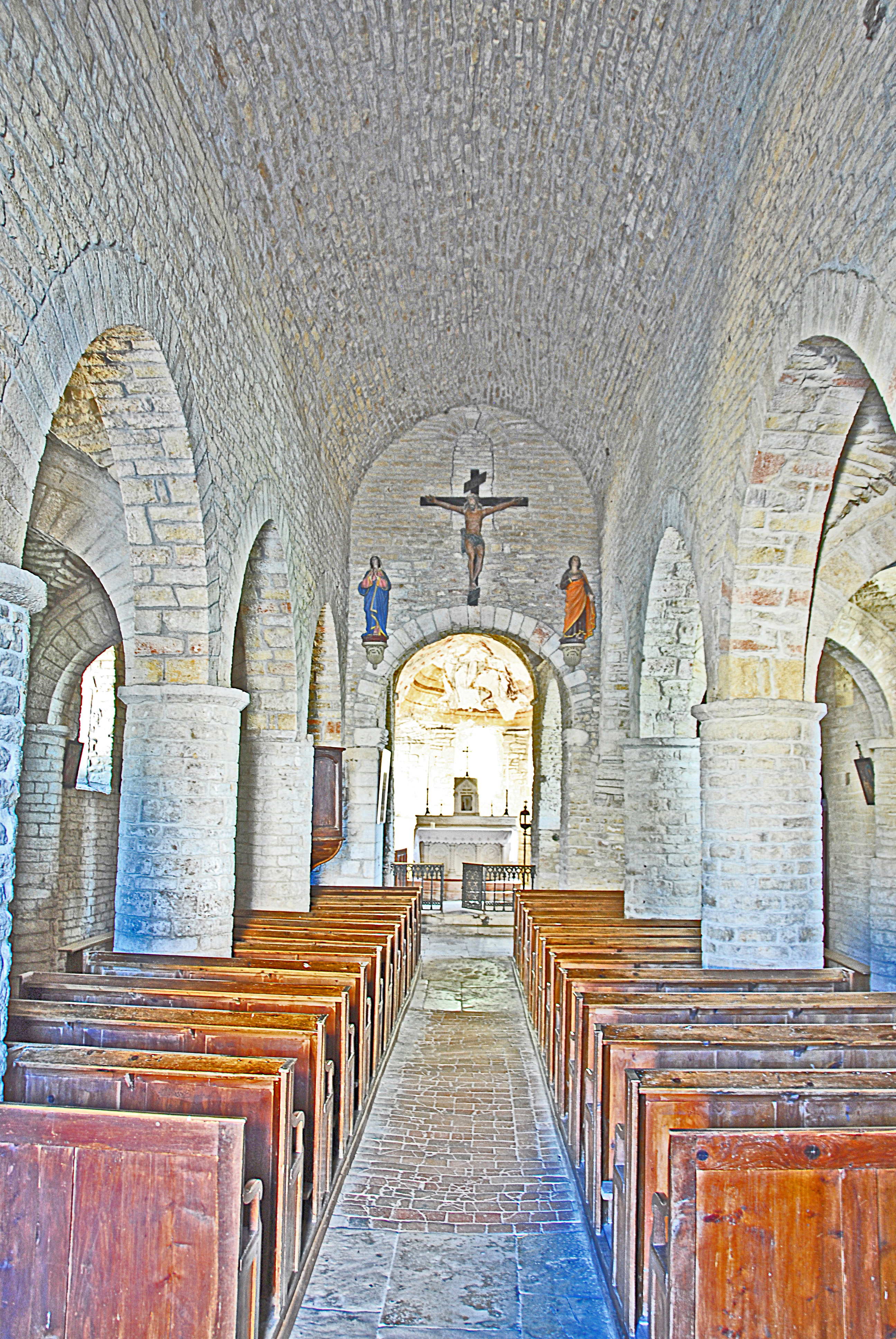 St-Bathélémy, Farges, Mittelschiff